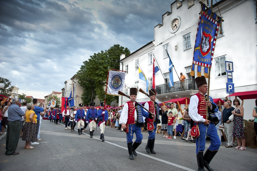 Mimohod povijesnih postrojbi HV u Bakru